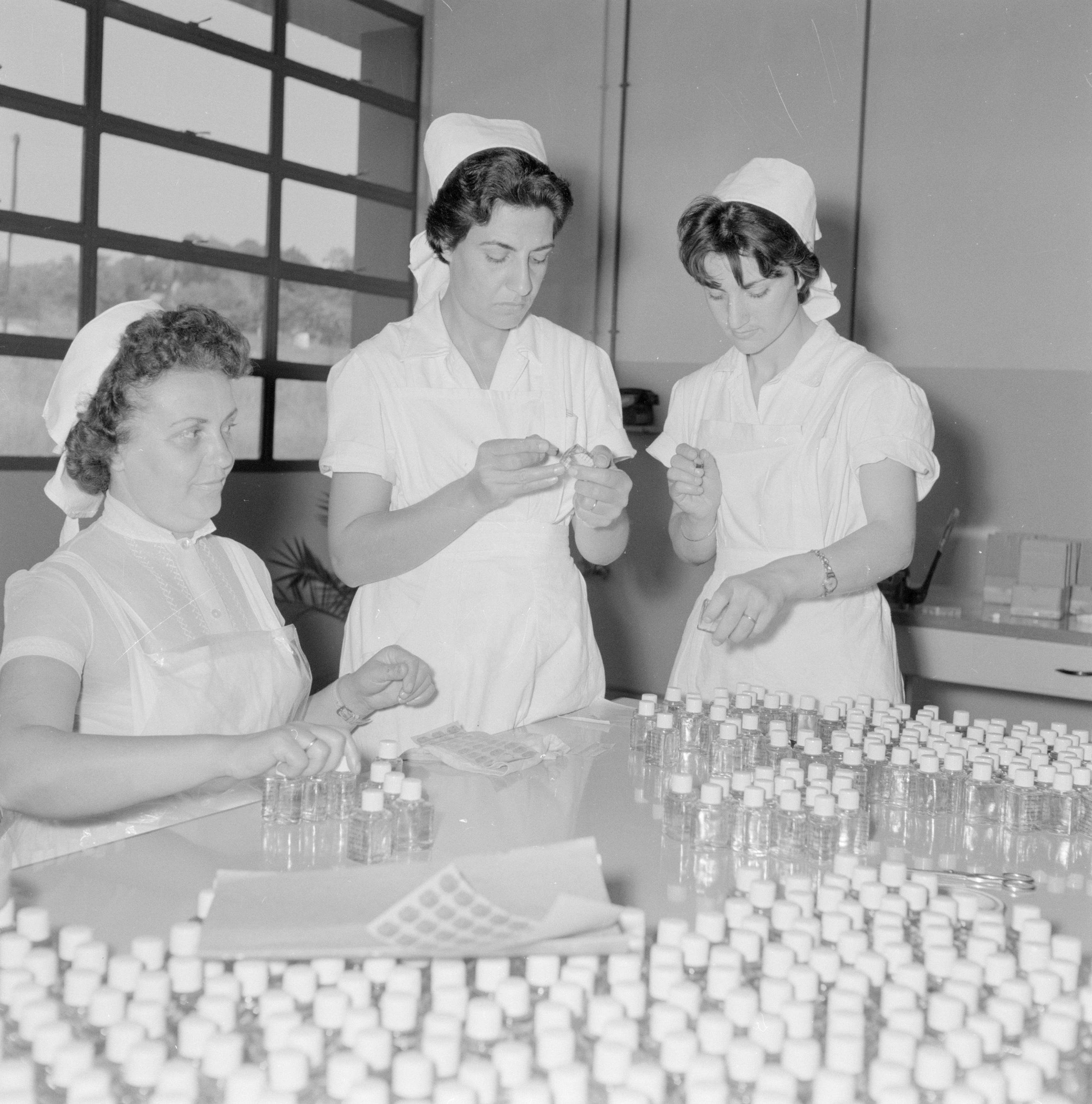 Collectie / Archief : Fotocollectie Van de Poll Reportage / Serie : [ onbekend ] Beschrijving : Fabriek voor schoonheidsproducten Helena Rubinstein in Nazareth. Medewerksters bezig met het beplakken van flesjes met etiketten Datum : 1 januari 1964 Locatie : Israël, Nazareth Trefwoorden : arbeiders, cosmetica, fabrieken, industrie, producenten Persoonsnaam : Rubinstein, Helena Fotograaf : Poll, Willem van de, [onbekend] Auteursrechthebbende : Nationaal Archief Materiaalsoort : Negatief (zwart/wit) Nummer archiefinventaris : bekijk toegang 2.24.14.02 Bestanddeelnummer : 255-4422